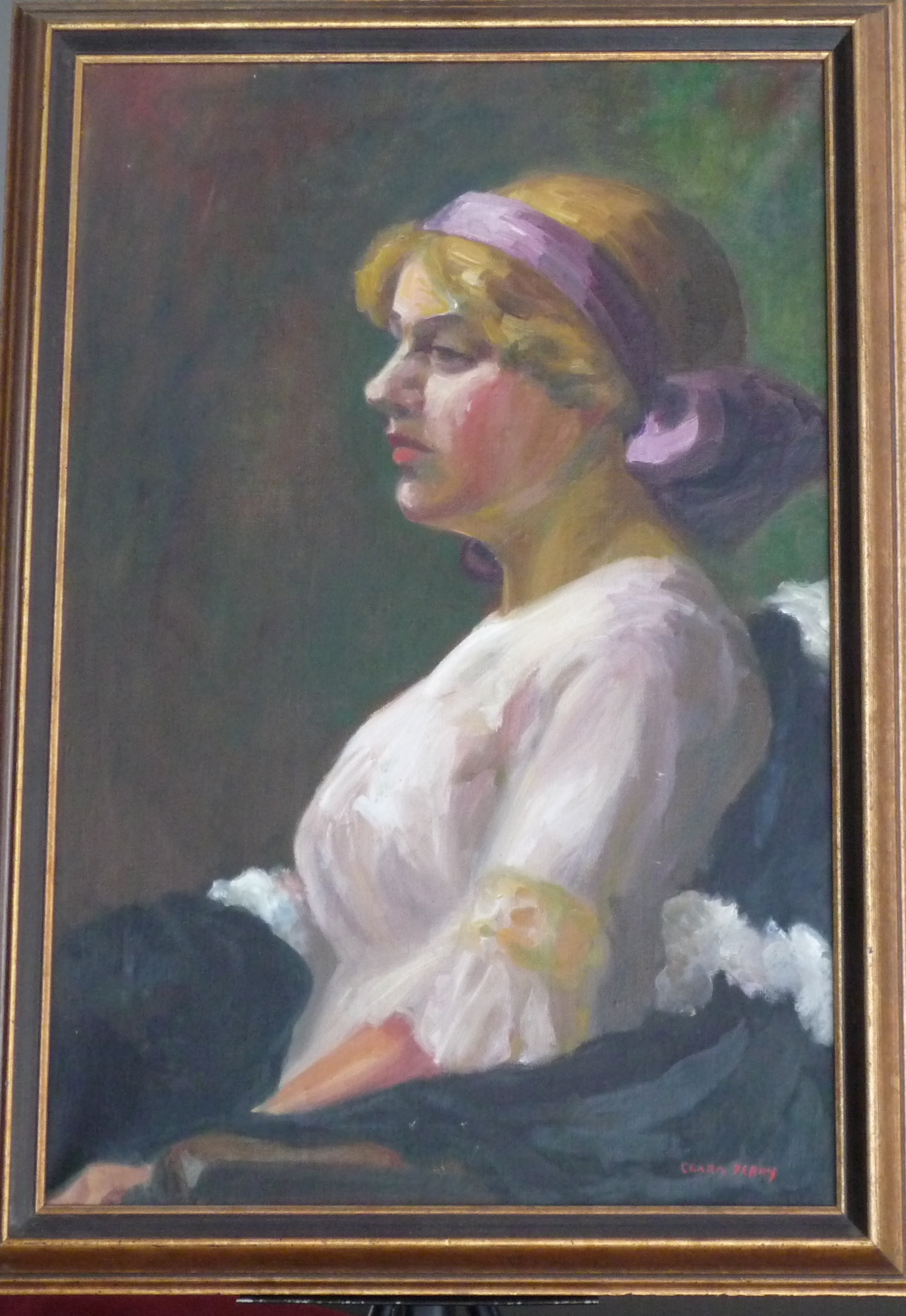 Self-portrait